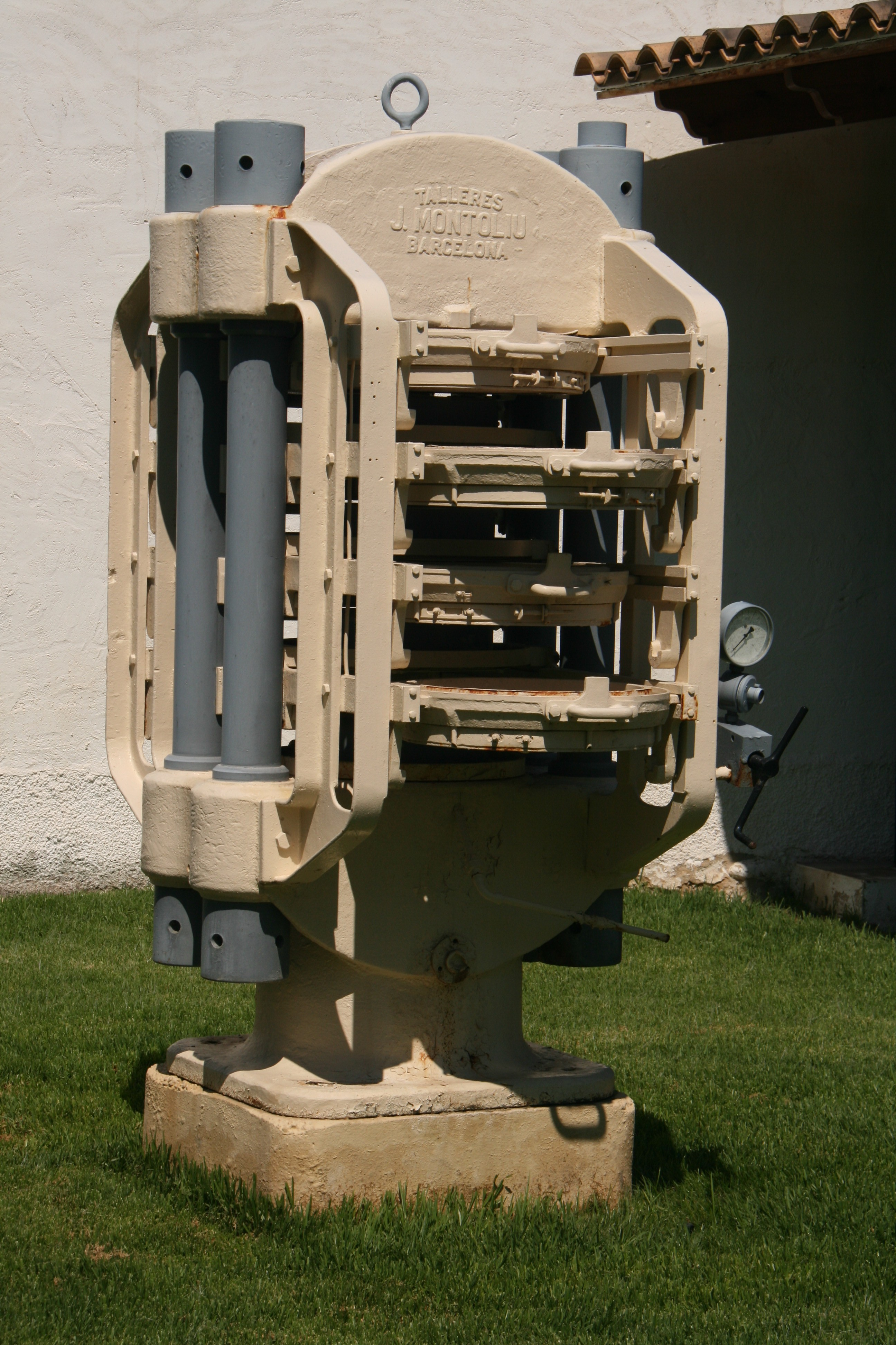 Prensa hidráulica (1950) - Villajoyosa